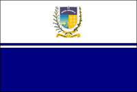 Bandeira de Água Branca